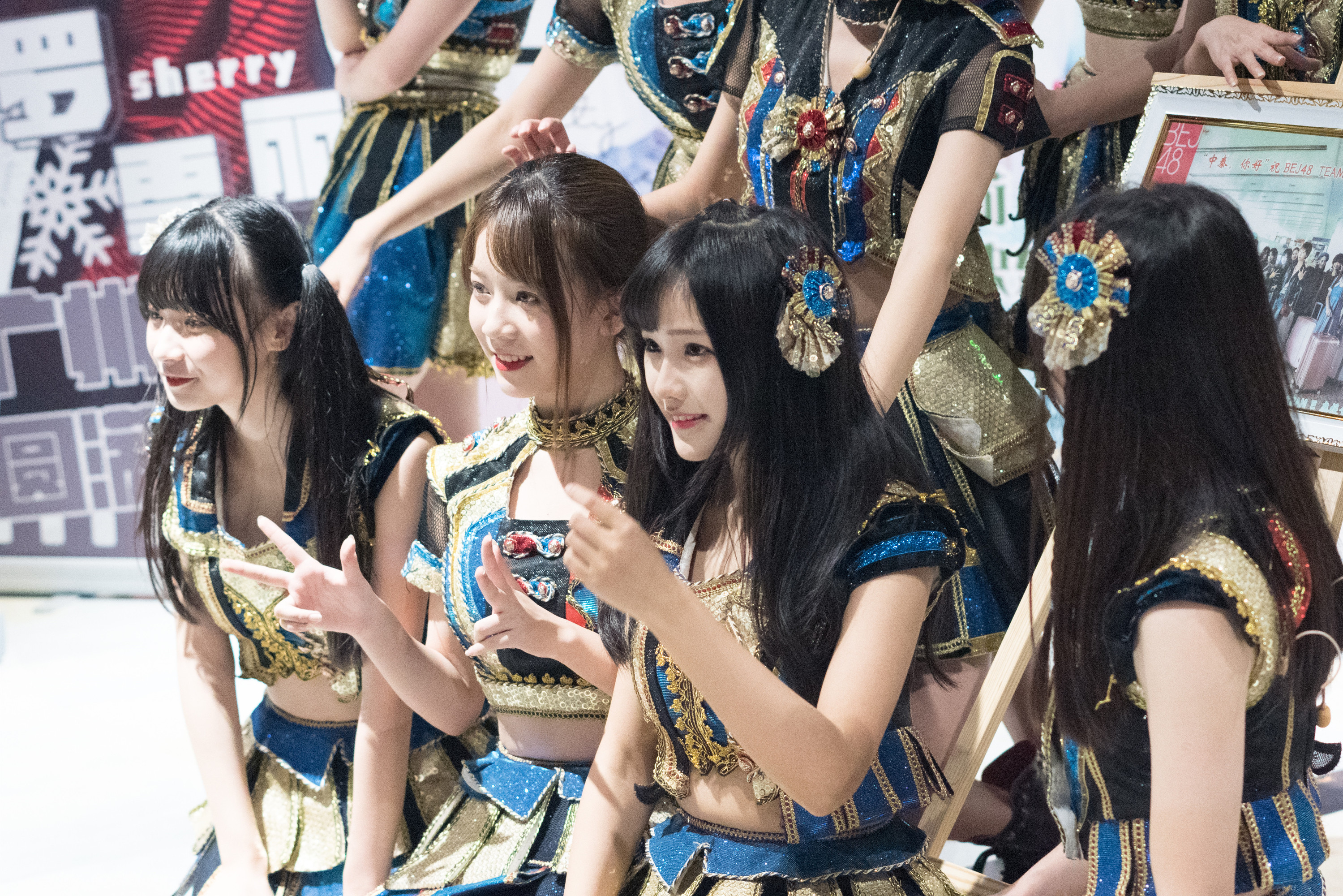 20171021——BEJ48 Team E广州巡演第一场